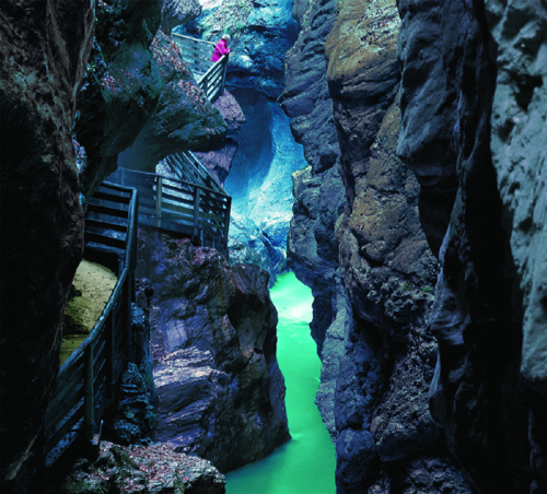 Liechtensteinklamm